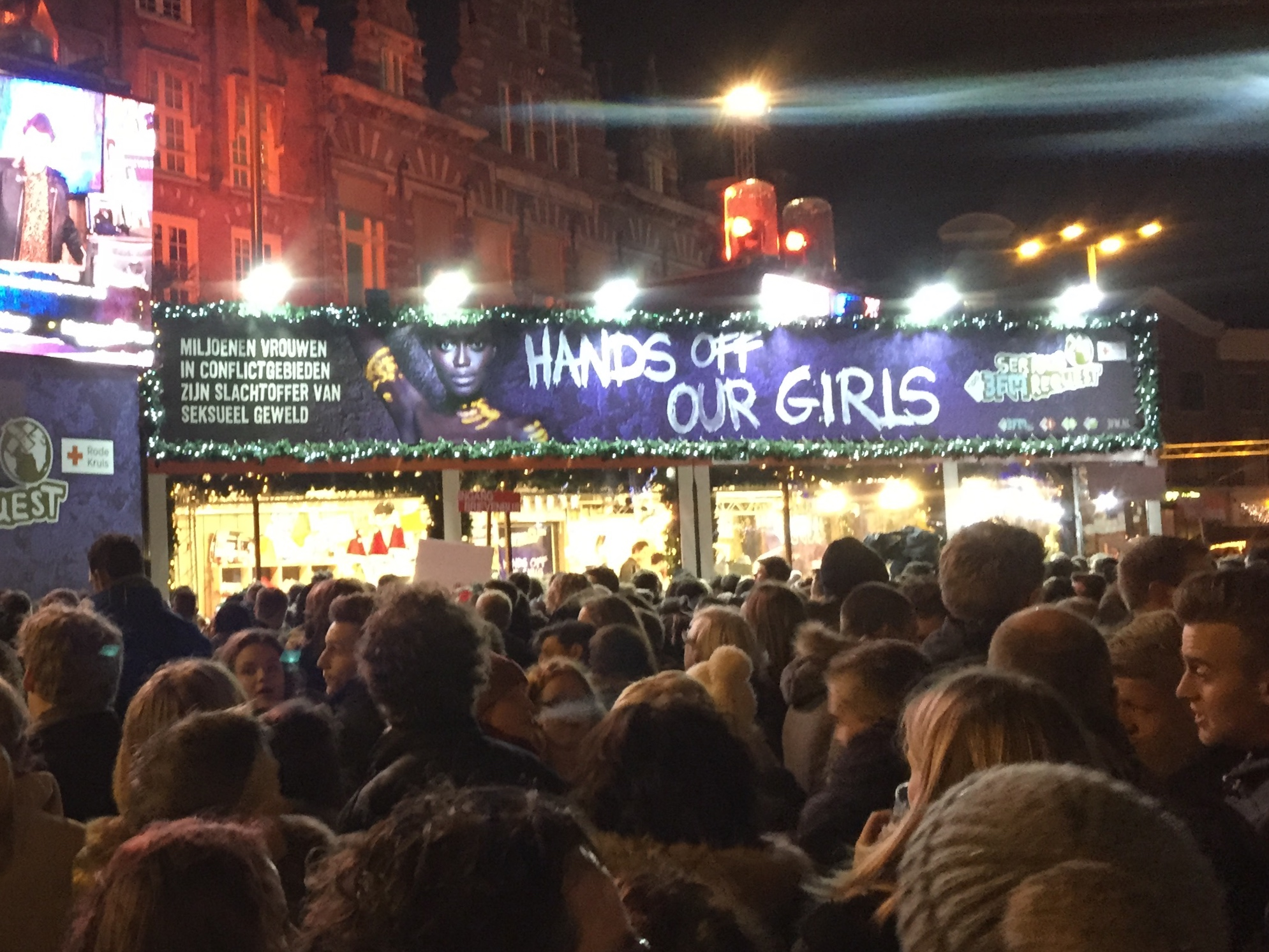 Glazen Huis op Grote Markt in Haarlem